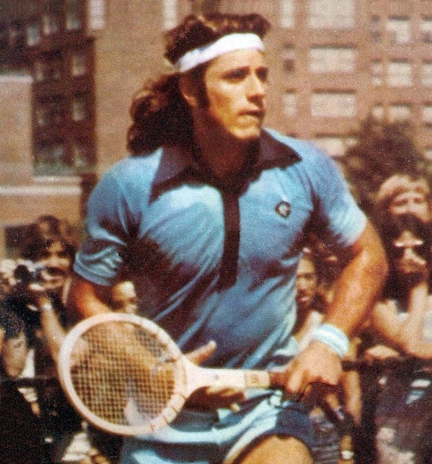 El Grafico del 03 de Septiembre de 1975. Edicion 2917